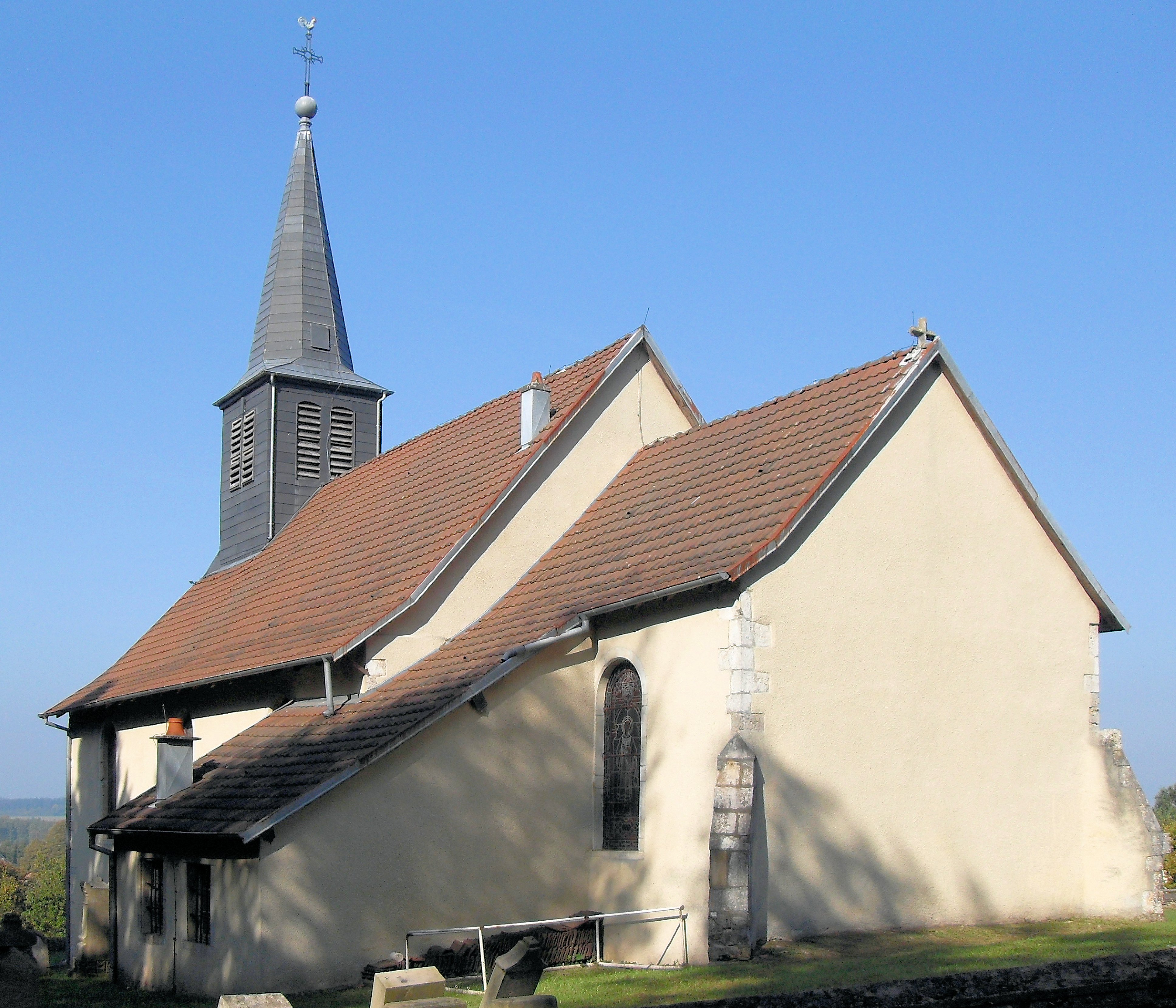 L'église Saint-Étienne à Brebotte